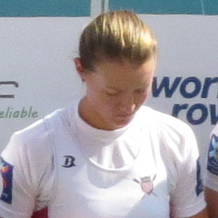 Podium du W4- GBR : CHIN, Rebecca BENNETT, Karen GOODERHAM, Lucinda NORTON, Holly USA : O'BRIEN, Kristine LATZ, Grace MARTELLI, Adrienne et LUCZAK, Grace CHN : YIN, Dameng, CHENG, Wenjing, YI, Liqin et YU, JING